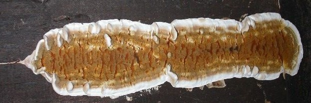 Serpula lacrimans - Hausschwamm